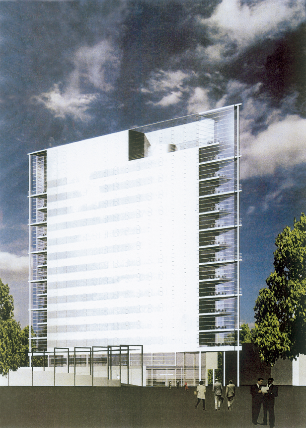 Jyväskylän INNOVA